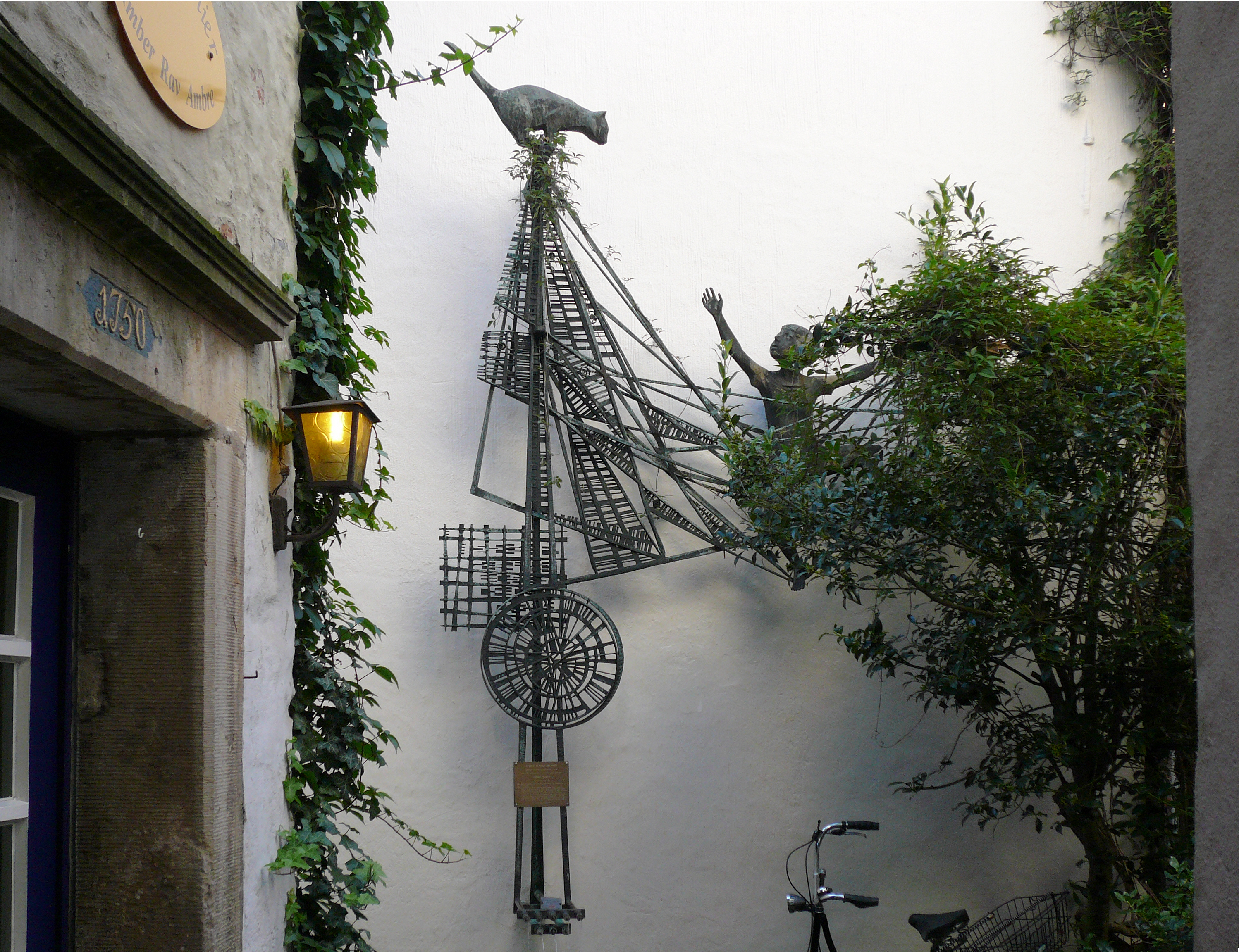 Die Ottjen-Alldag-Plastik bei dem Ottjen-Alldag-Brunnen im Schnoorviertel in Bremen, Deutschland. Die Ottjen-Alldag-Pastik wurde 1964 von dem deutschen Bildhauer Claus Homfeld geschaffen.